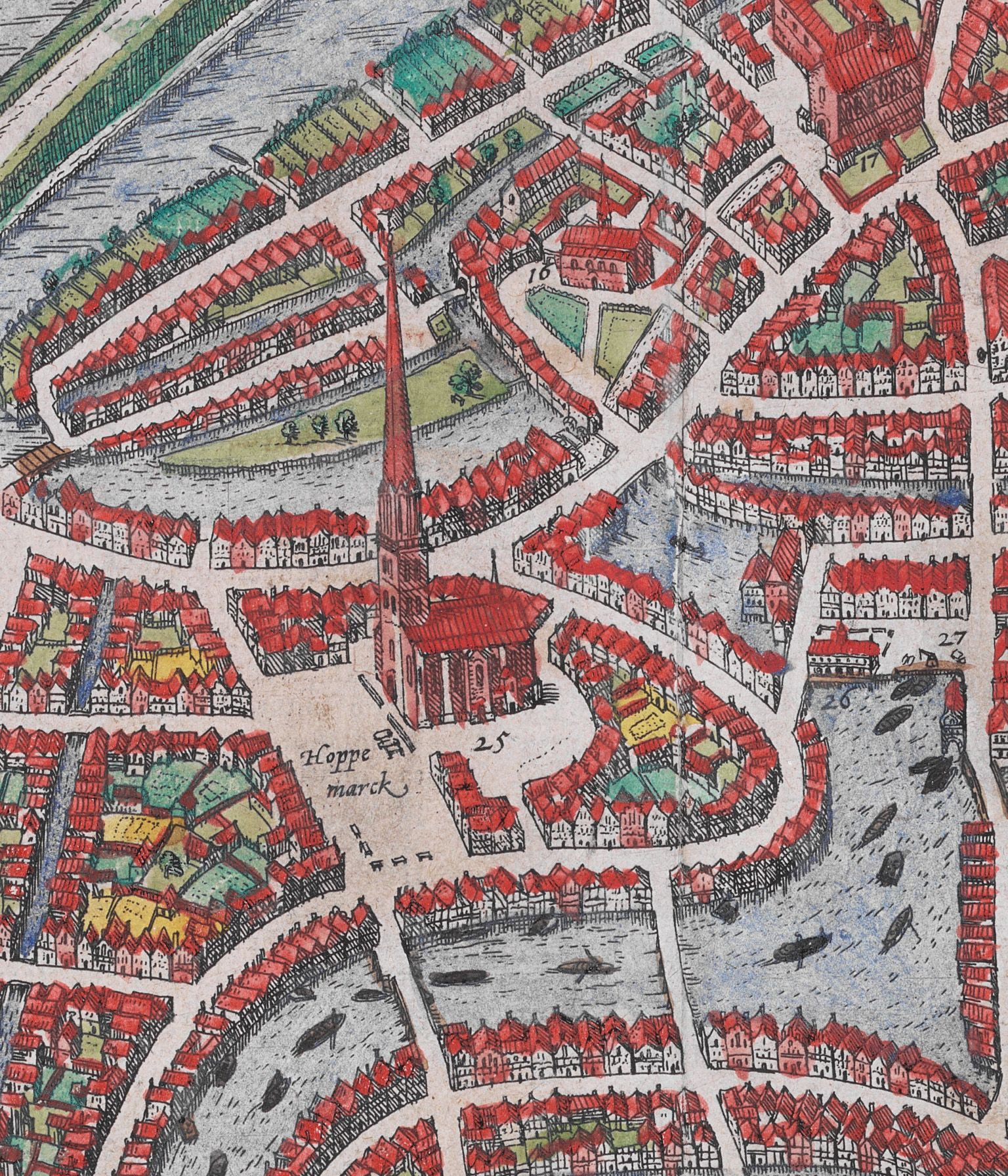 Neuauflage der 1588 im vierten Band des Städtebuchs "Civitates Orbs Terrarium" von Georg Braun und Franz Hogenberg erschienenen Vogelschaukarte.detail St. Nikolai